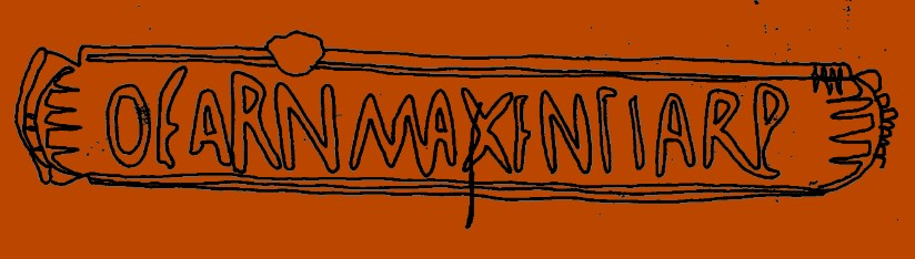 Röm. Ziegelstempel in Form einer Tabula ansata d. Norischen Hilfstruppen auf Plattenziegel (OFARN-Gr.), Stift Klosterneuburg, Kreuzgang Ost, 32x15,8 cm, Stempel 6,5-7 cm 4. Jhdt. n.Chr. Quelle : Hannsjörg Ubl: I. Das Römische Lapidarium, Stiftsmuseum Klosterneuburg 1991, S. 95